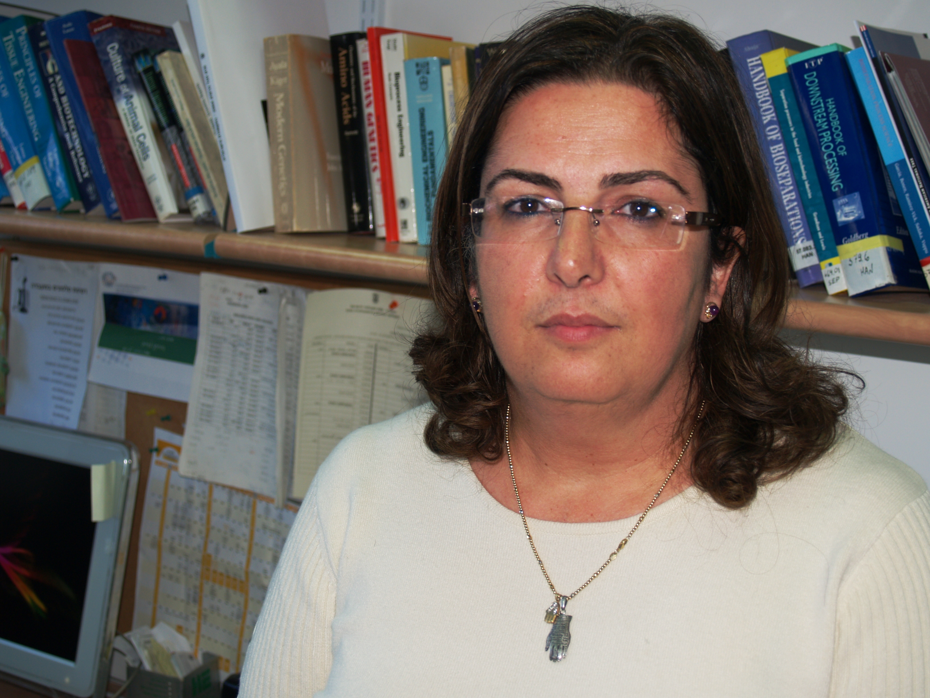 Marcelle Machluf